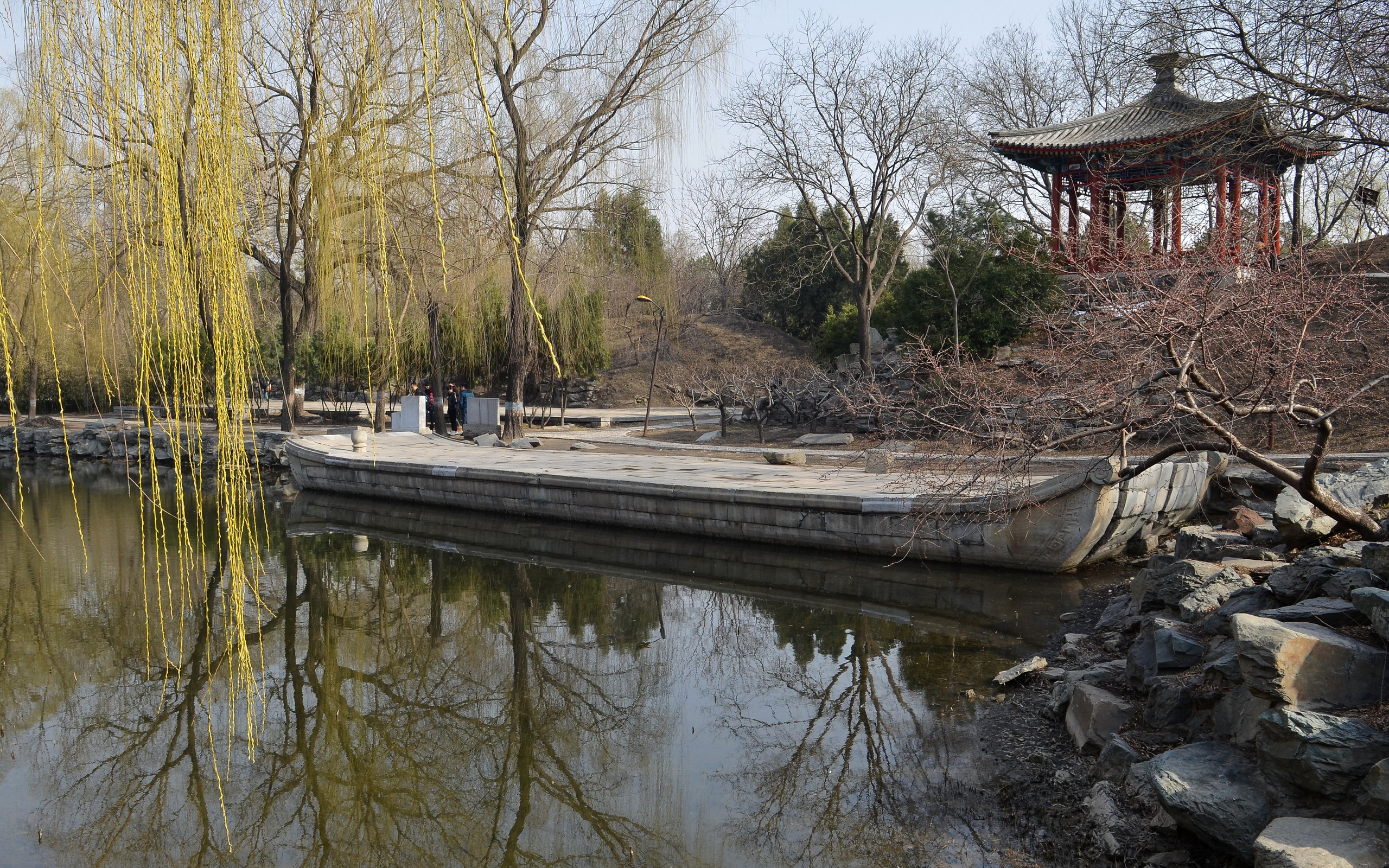 中文（中国大陆）: 圆明园福海东南的“别有洞天”遗址, 在1985-1992年间整修山形河道, 修复石舫基座, 复建山坡上的四方亭.